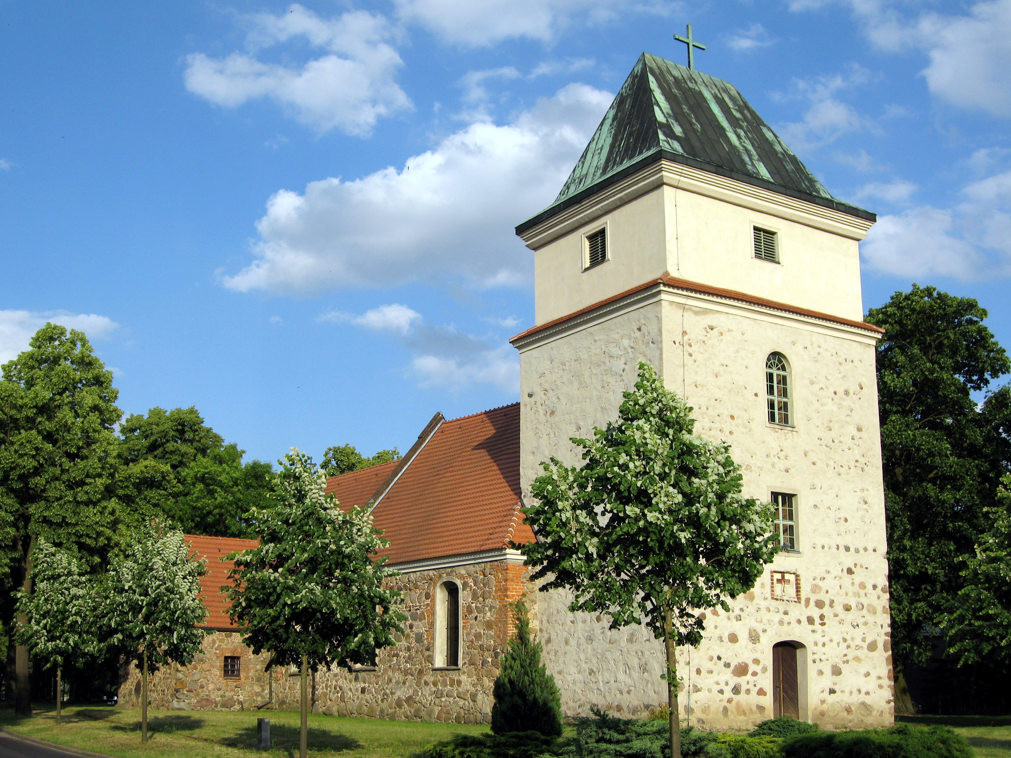 Dorfkirche von Schönerlinde, Gemeinde Wandlitz, Landkreis Barnim, Land Brandenburg, Deutschland